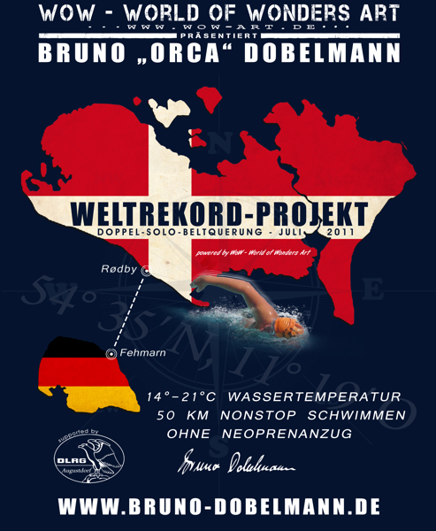 Weltrekord Projekt Doppel-Solo-Beltquerung (Bruno Dobelmann)